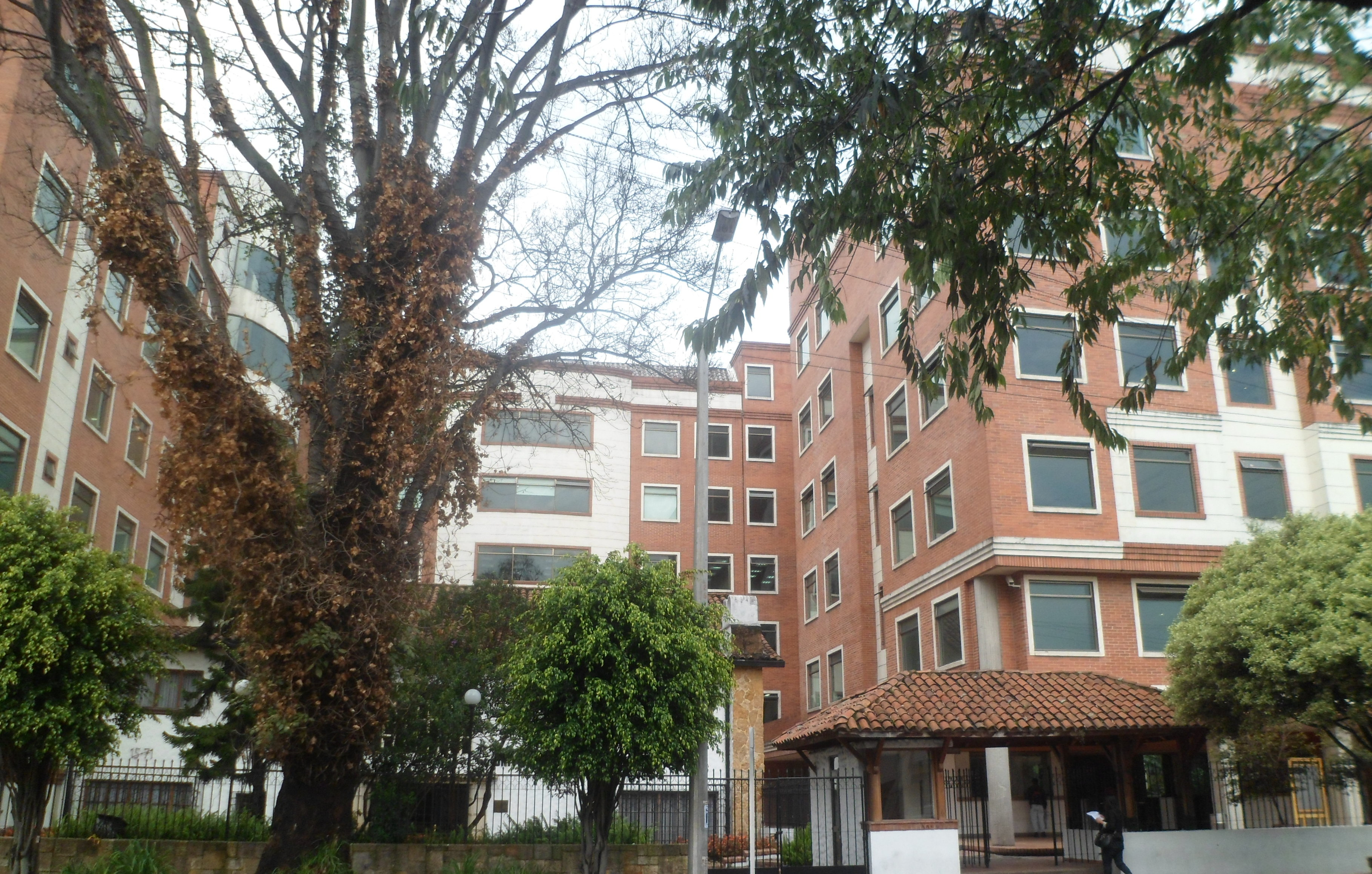 Facultad de Ciencias Sociales, Humanidades y Artes de la Universidad Central De Colombia